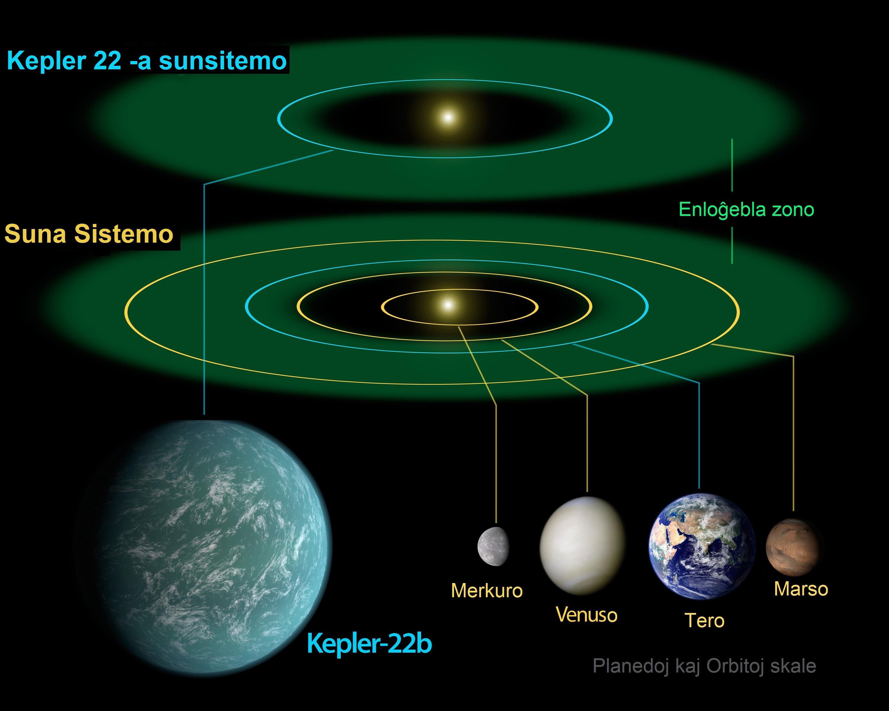 Kepler 22b lokata en la enloĝebla zono kaj la komparada inter la Tera sunsistemo kaj la Kepler 22b -a sunsistemo